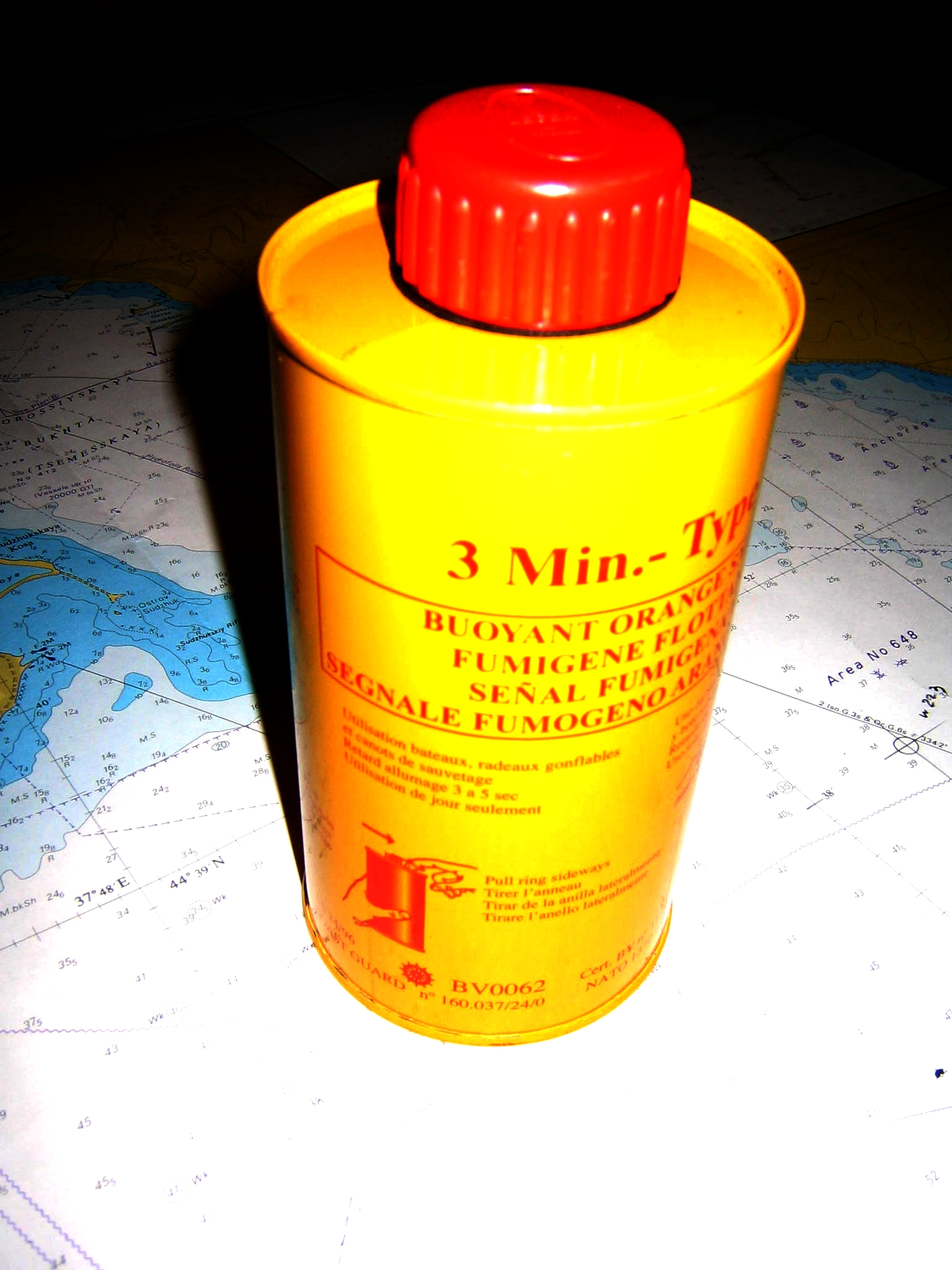 fumigène orange - Orange smoke signal - Sécurité maritime